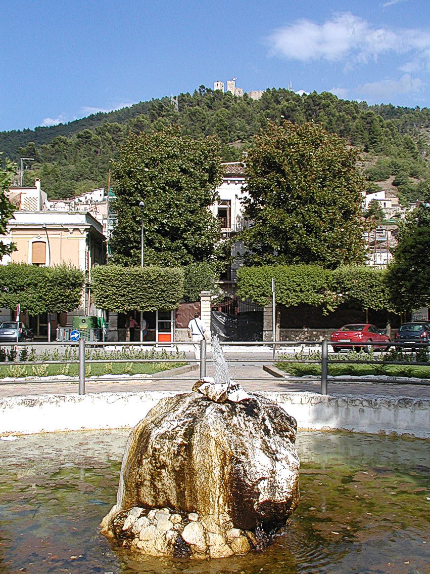 Popoli